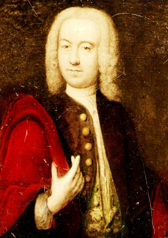 Georg Ludwig Böhmer (1715-1797), zu Lebzeiten der dargestellten Person erschaffenes Öl- oder Pastell-Gemälde. Hiervon vor 1945 erstellte fotomechanische Reproduktion, hiervon 2008 erstellte Reproduktion